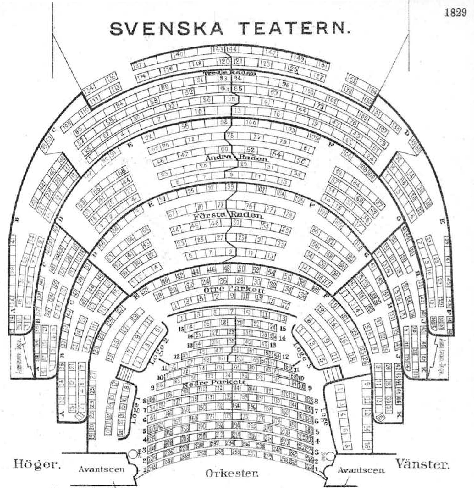 Plan över Svenska teaterns i Stockholm salong, 1920.